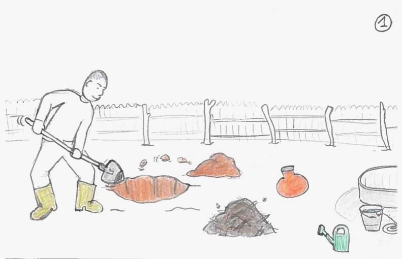 Dans un jardin clôturé et disposant d'un accès à l'eau, creuser un trou de 50cm de profondeur et 1m de diamètre, remplissez le d'un mélange de terre et compost, et disposez la jarre au centre, enterrée jusqu'au col.